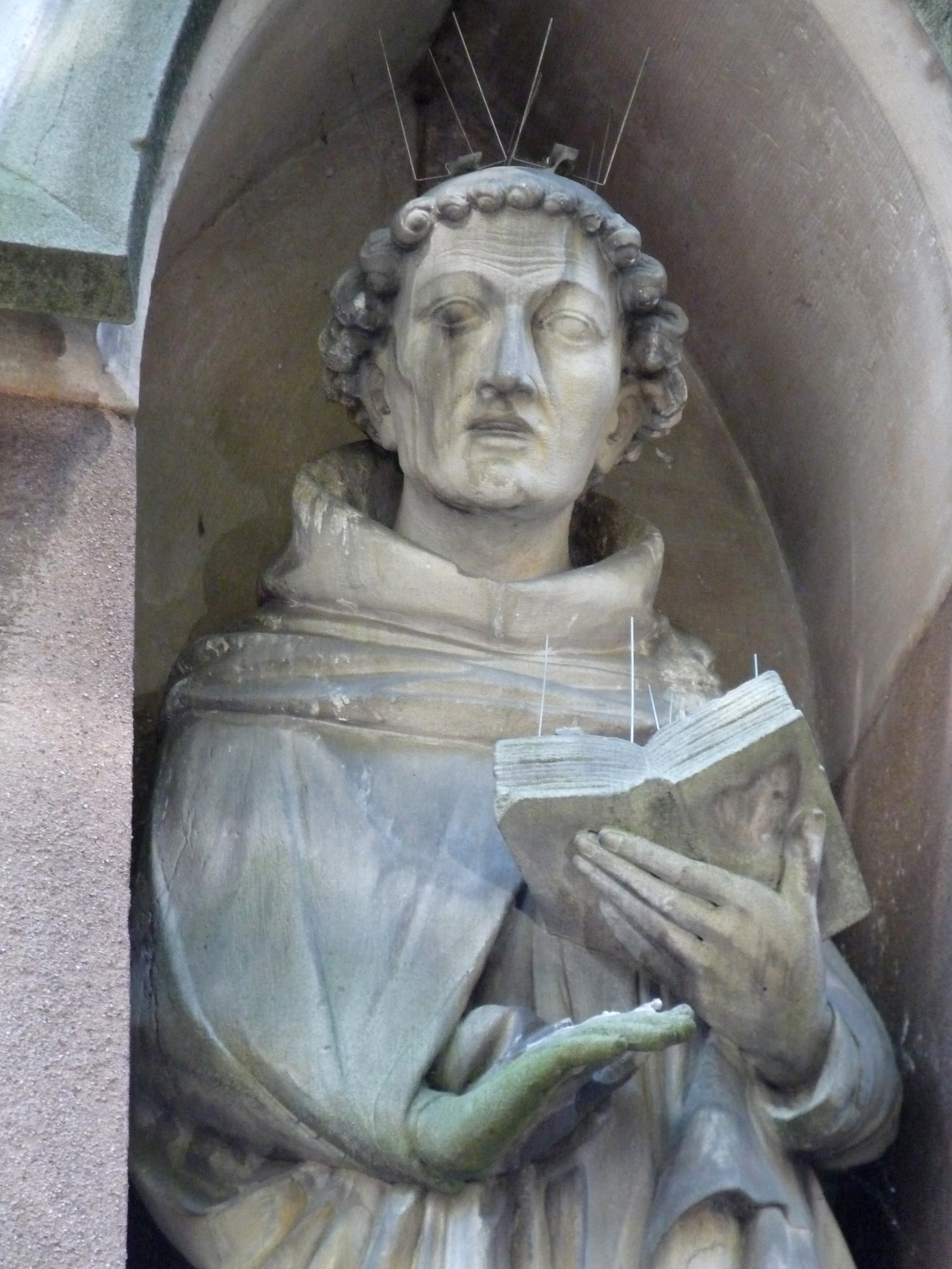 Statue de Jean Tauler dans une niche de la façade sud de l'église Saint-Pierre-le-Jeune protestant (Strasbourg). Statues détruites pendant la Révolution, reconstituées en 1898 par le sculpteur en chef de l'Oeuvre Notre-Dame, Ferdinand Riedel (1863-1912)